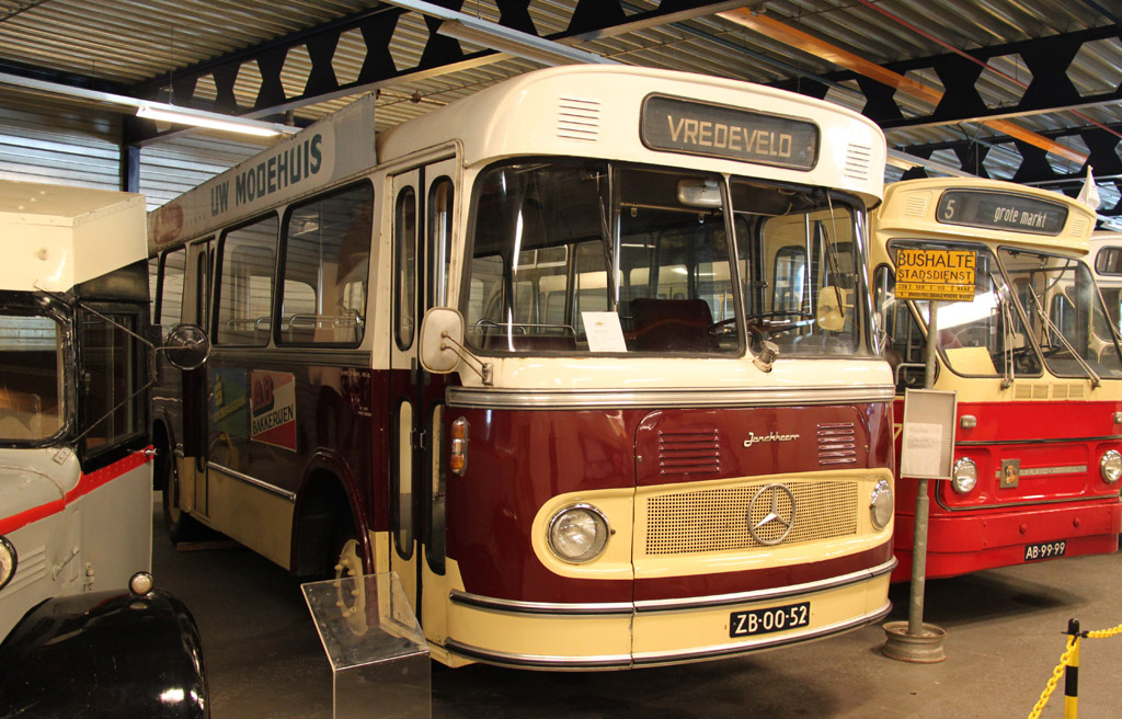 Bus 66 van Harmanni in het Nationaal Bus Museum in Hoogezand.